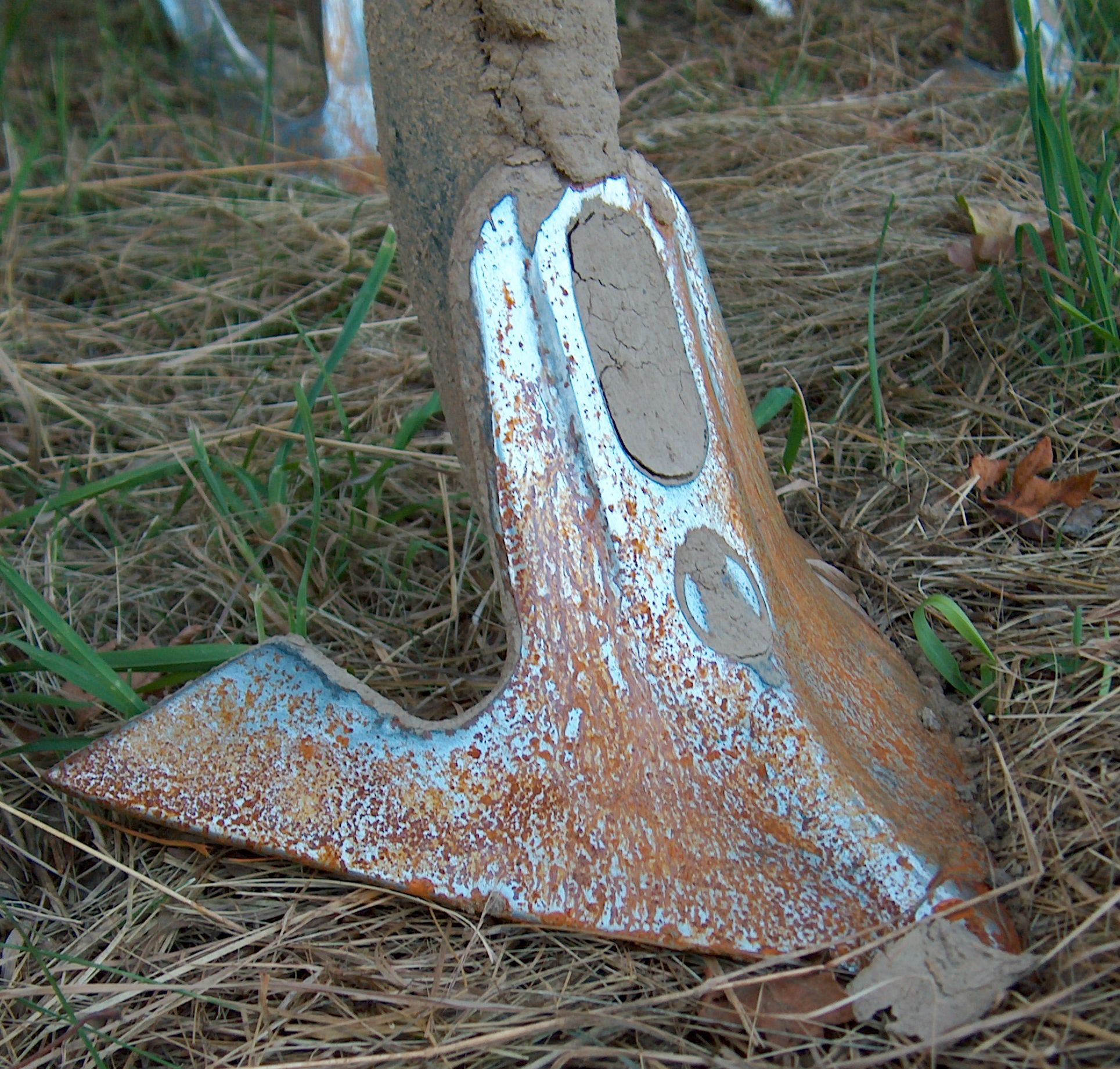 Gänsefußschar eines Grubbers